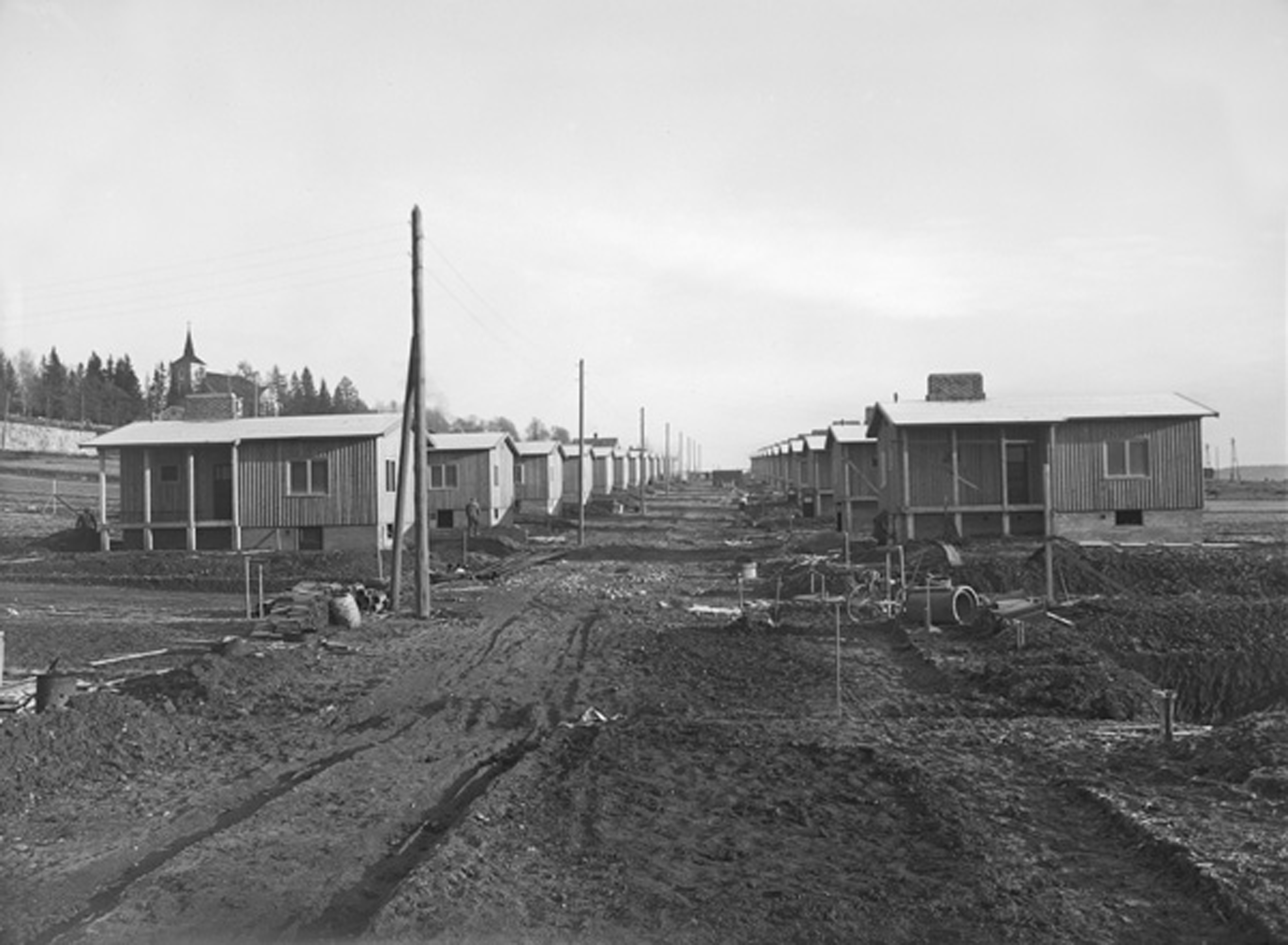 Kärkänkadun ruotsalaistalot